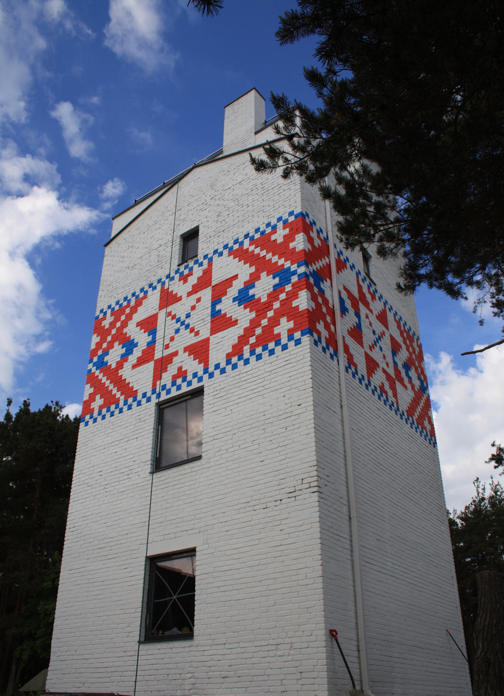 Lasva Veetorni Galerii